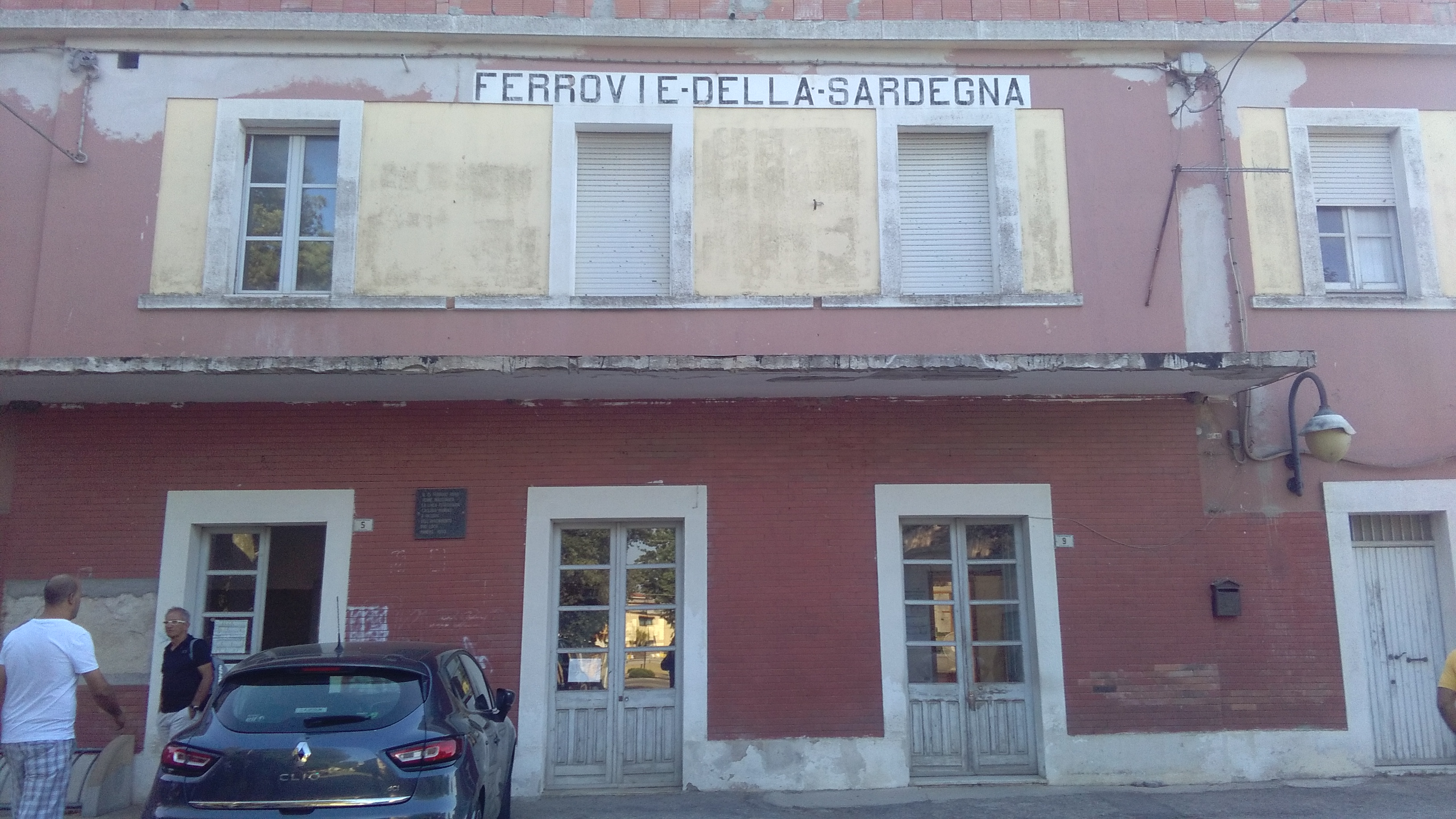 Facciata lato strada del fabbricato viaggiatori della stazione di Mandas.